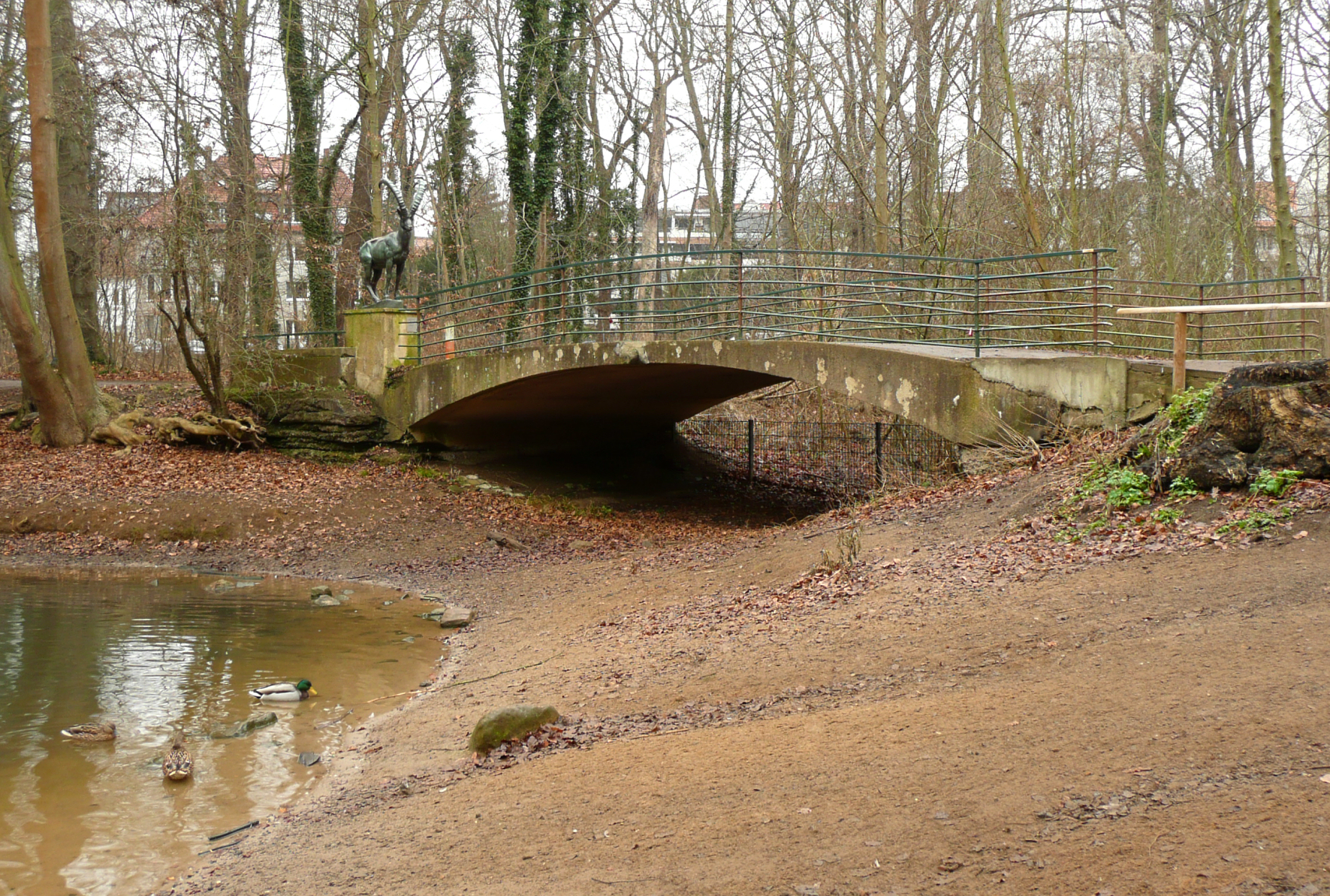 Großer Teich, Ententeich, in Hannover